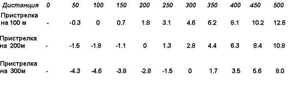 Таблица в MOA1